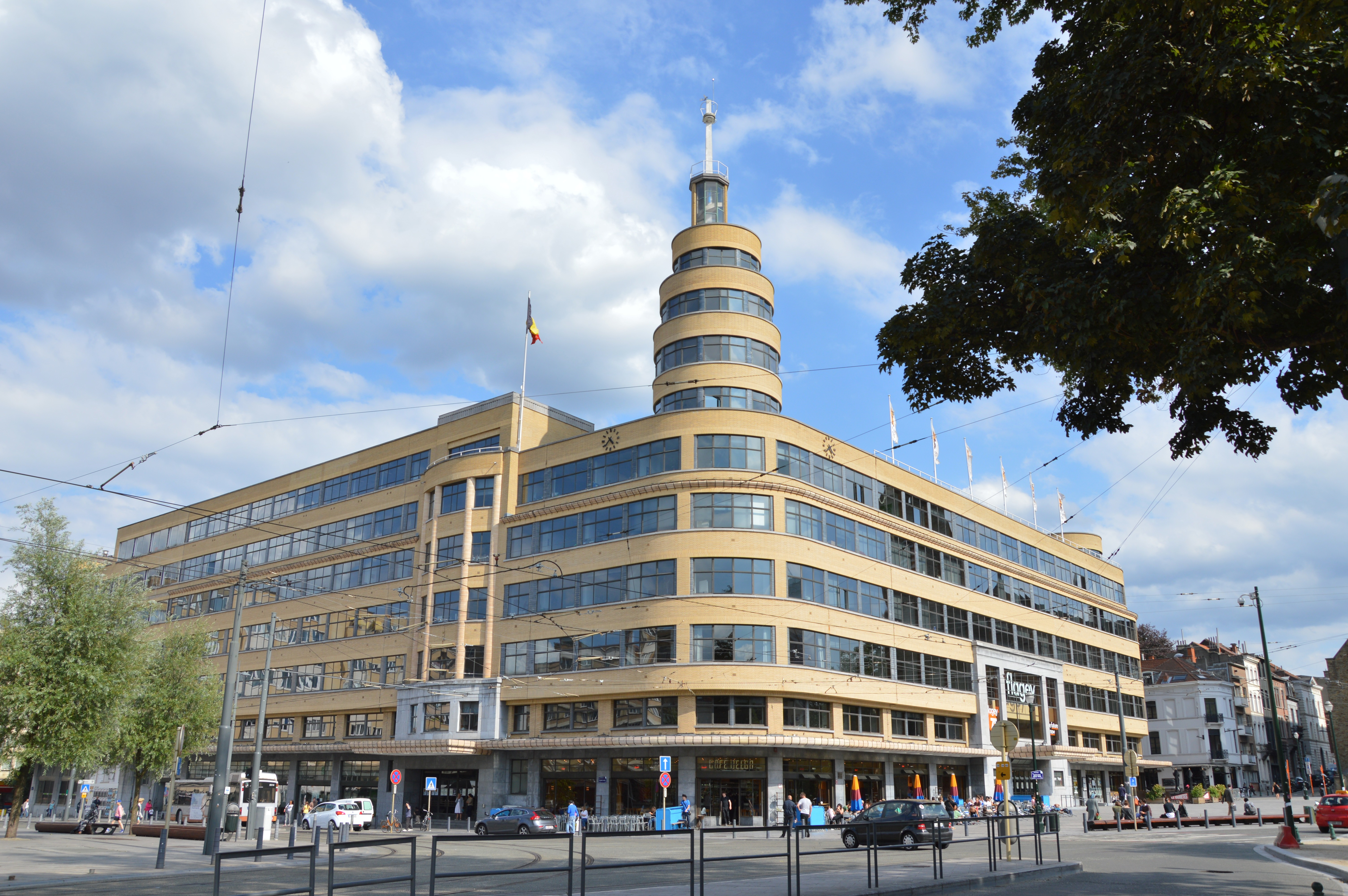 Place Eugène Flagey, 18 à Ixelles. Construit en 1933-1938 par J. Diongre